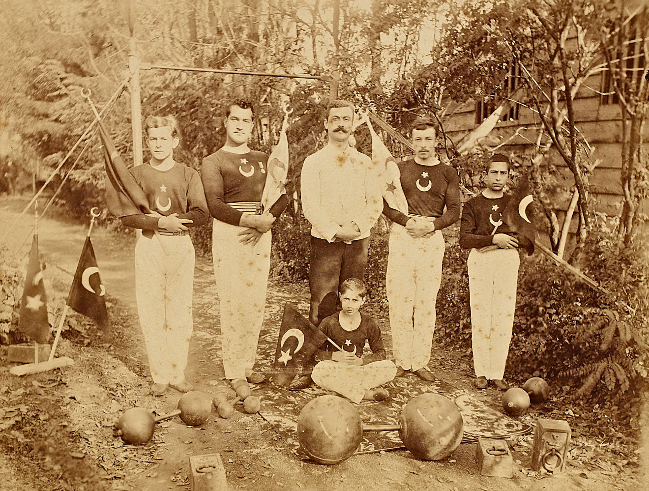 Mekteb-i Sultani öğrencileri